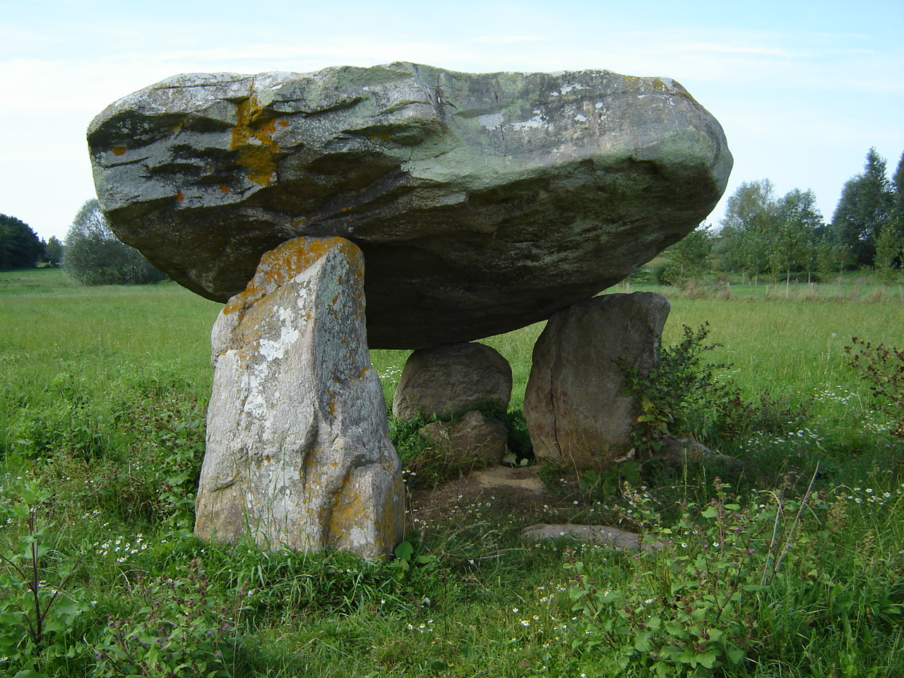 Le Dolmen de la Roche aux Loups ou « Pierre aux Loups » est situé au village de Bergon. Ce dolmen possède une énorme table penchée longue de quatre mètres.